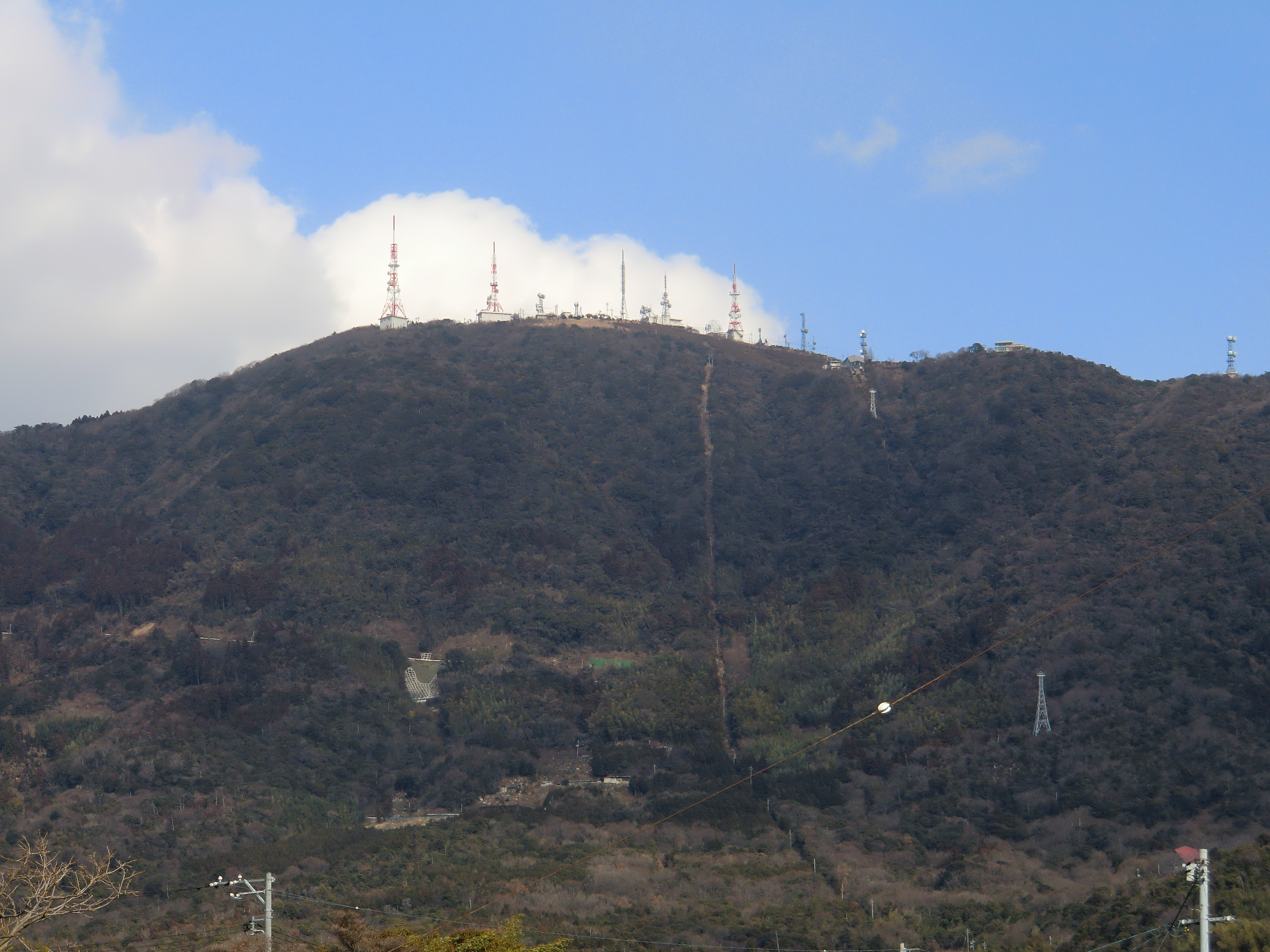 防府市大平山の遠景